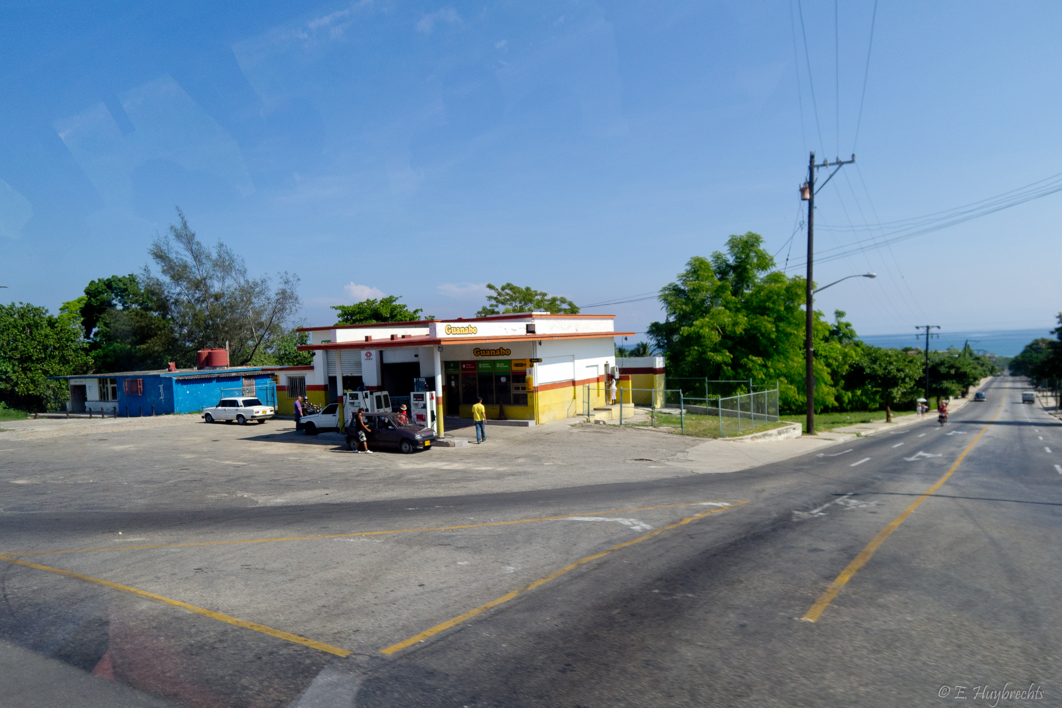 20 juillet 2011 (SAM_0617)